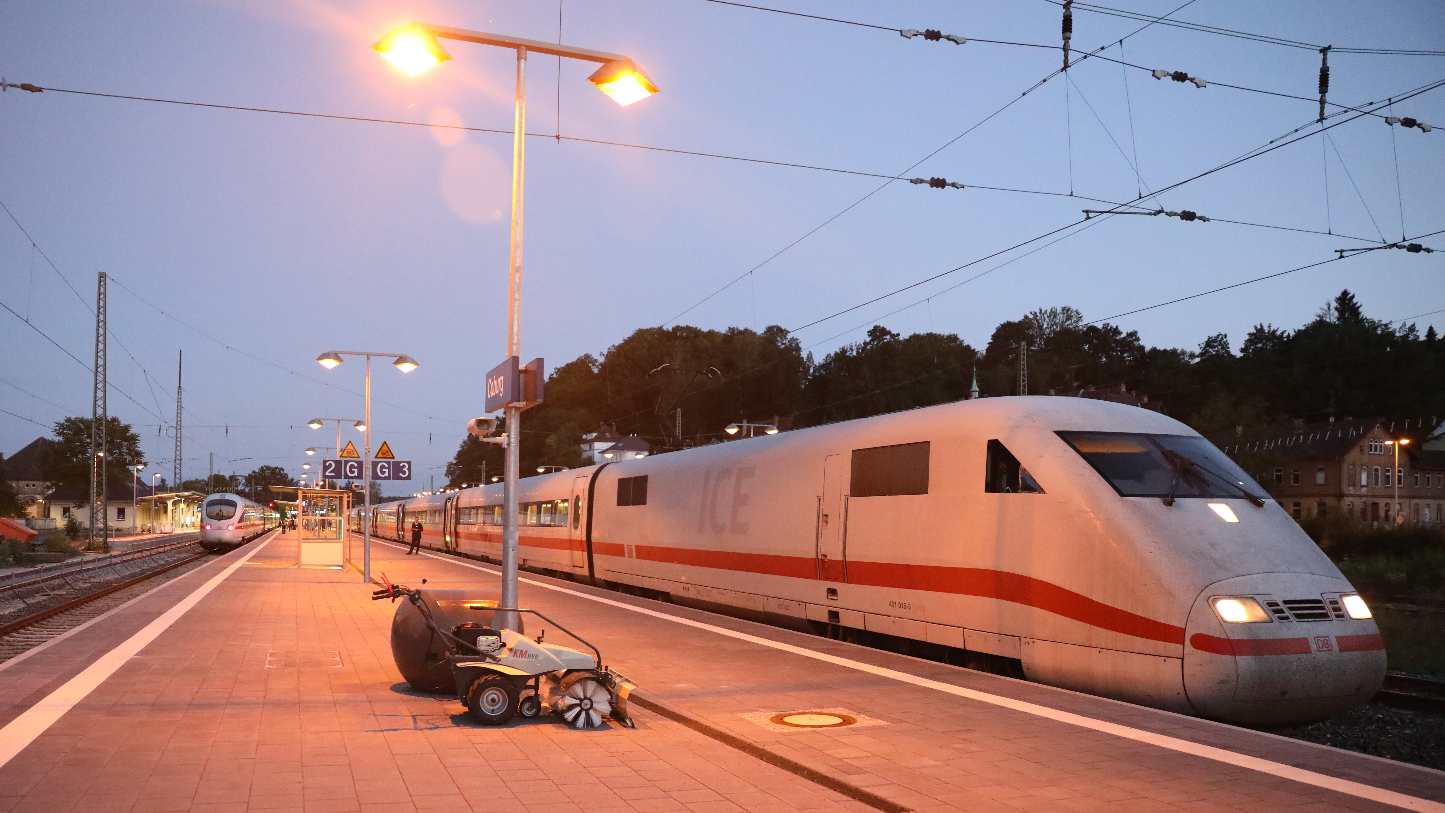 Coburg Bahnhof, Kreuzung zweier ICE